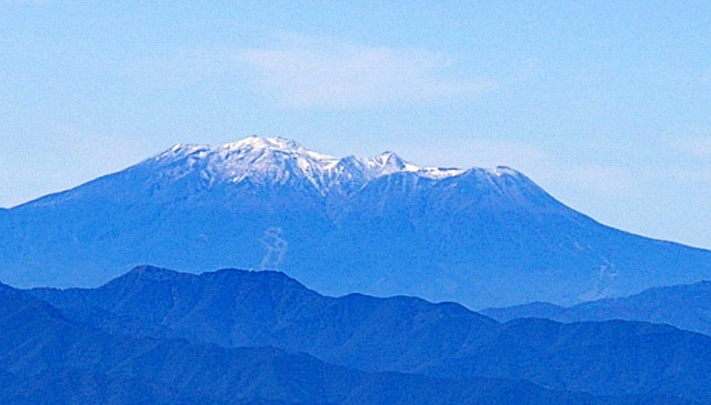 御嶽山(長野県)(八ヶ岳天狗岳山頂から撮影) Mt.Ontake (Nagano, JAPAN)